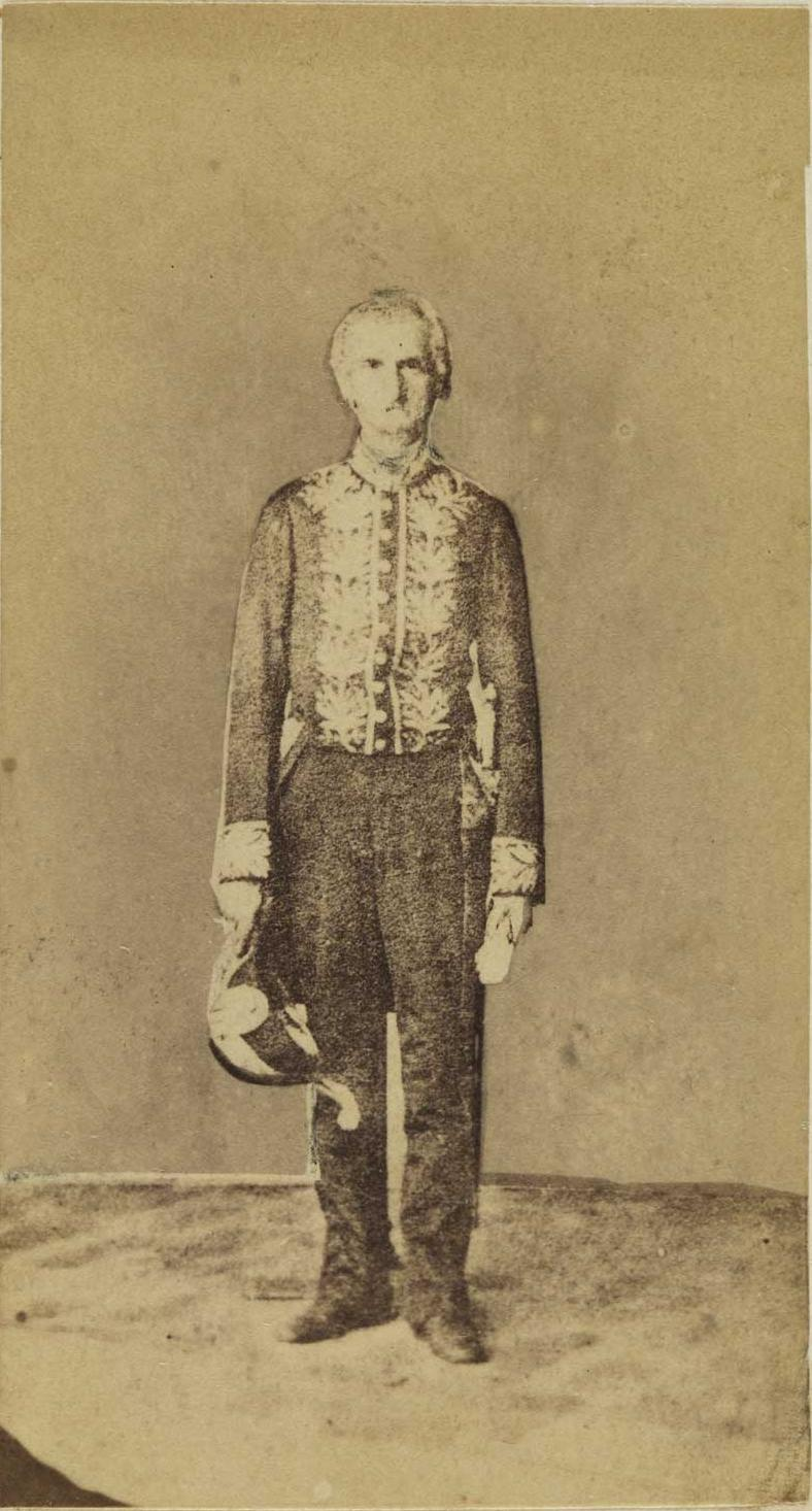 Domingo Francisco Sánchez